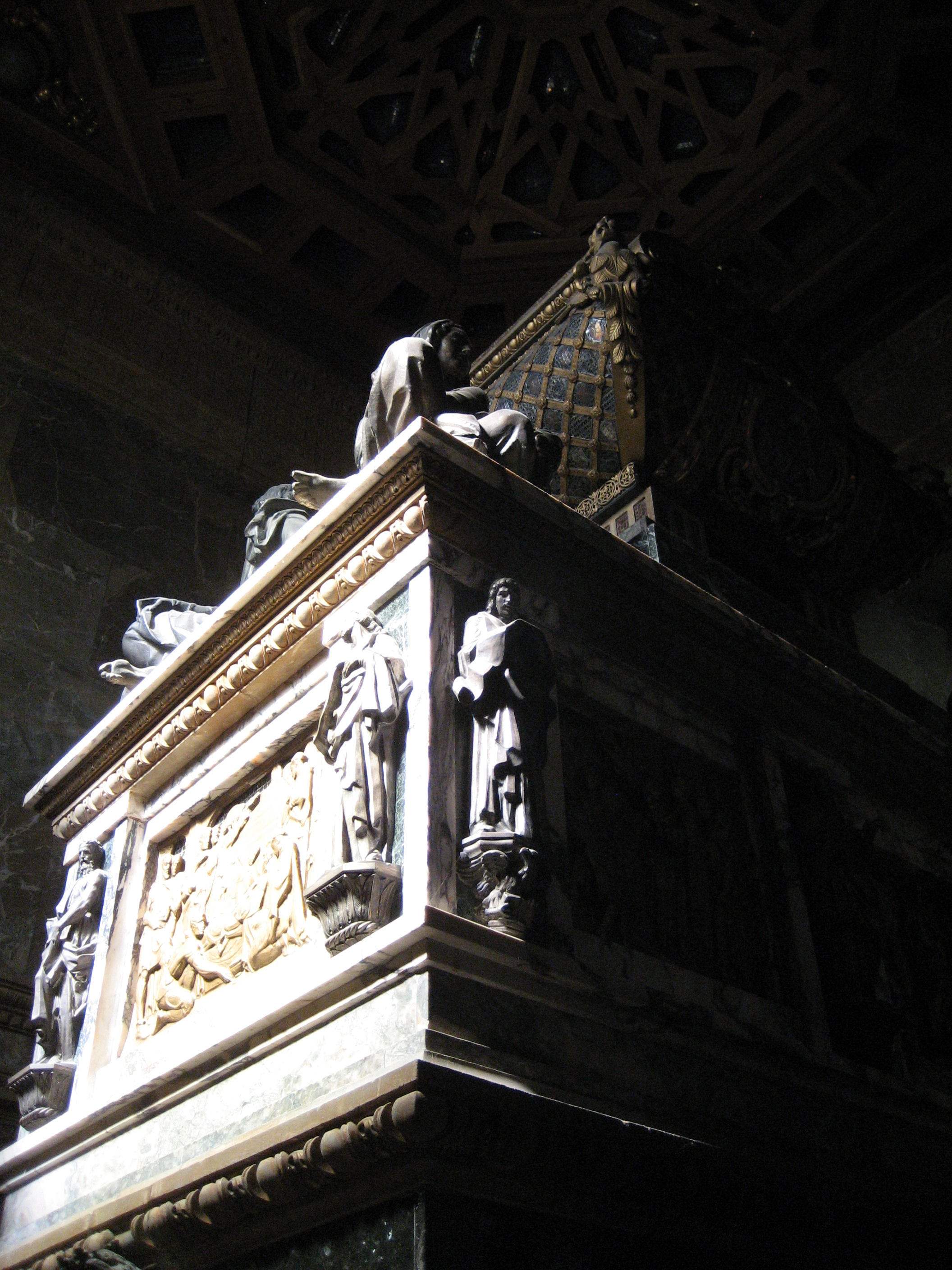 Sepulcro de San Juan de la Cruz en el convento de los carmelitas descalzos